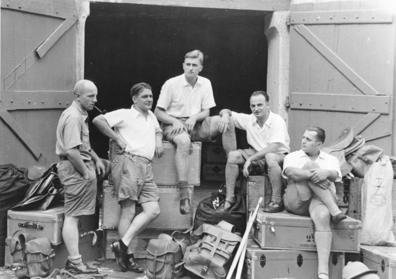 Tibetexpedition, Expeditionsteilnehmer Kalkutta, Expedition beim Magazinern [von links nach rechts: Wienert, Schäfer, Beger, Krause, Geer] Abgebildete Personen: Beger, Bruno Dr.: SS-Hauptsturmführer, Abteilungsleiter Sven-Hedin-Institut, Deutschland (GND 128720654) Schäfer, Ernst Dr.: SS-Sturmbannführer, Leiter des Sven-Hedin-Institutes, Deutschland (GND 123991420) Krause, Ernst: Mitarbeiter im Sven-Hedin-Institut, Deutschland